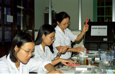 Minilab in Hanoi, Vietnam